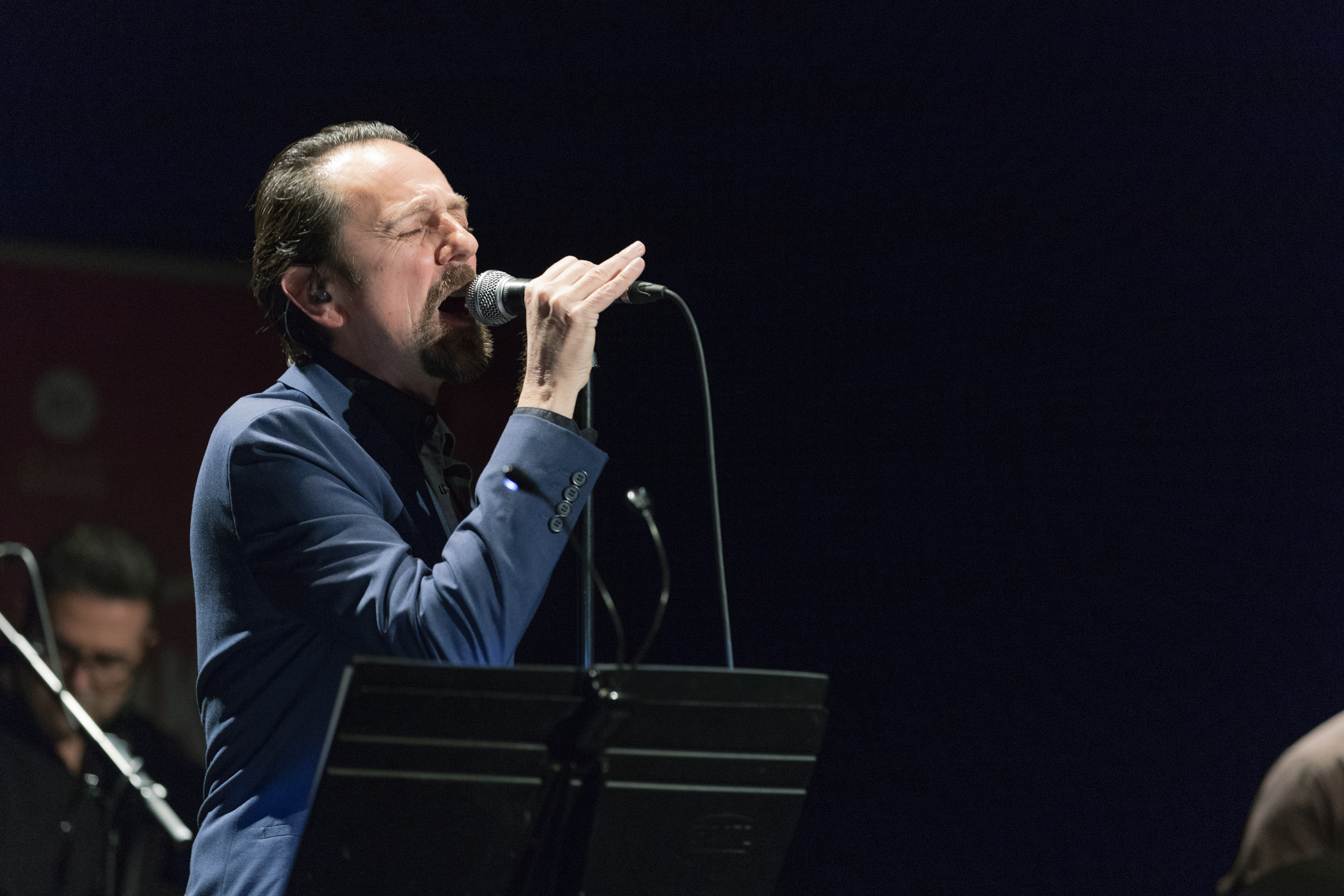 Imanol Larzabal aretoa (Lugaritz K.E) 2019/04/05 Antolatzailea: Donostia Kultura Argazkiak: Josu De La Calle